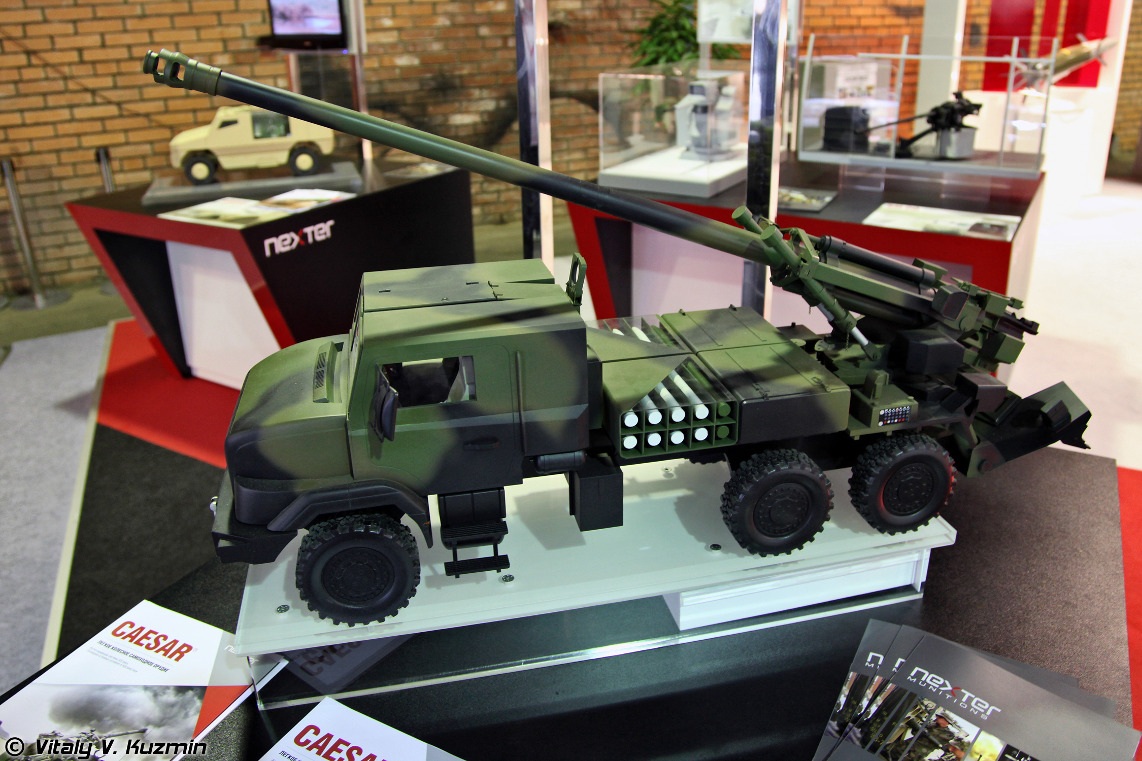 Модель 155-мм колесной самоходной артиллерийской установки CAESAR